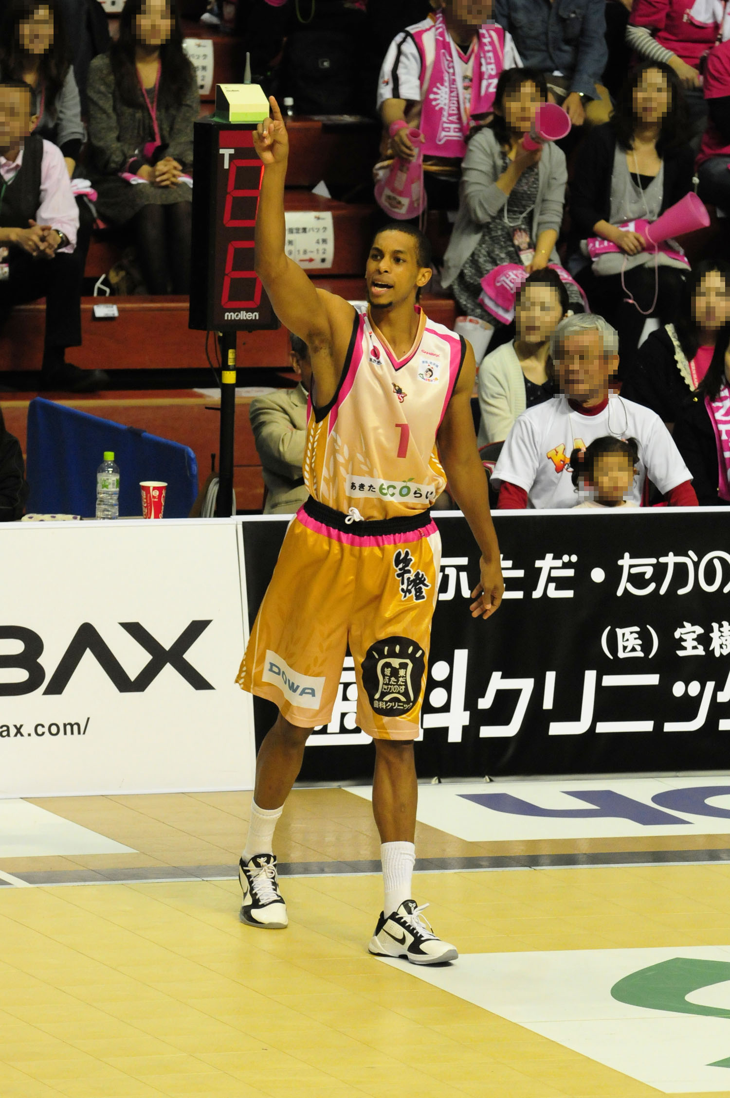 秋田ノーザンハピネッツ、E・J・ドレイトン選手。秋田市立体育館で。